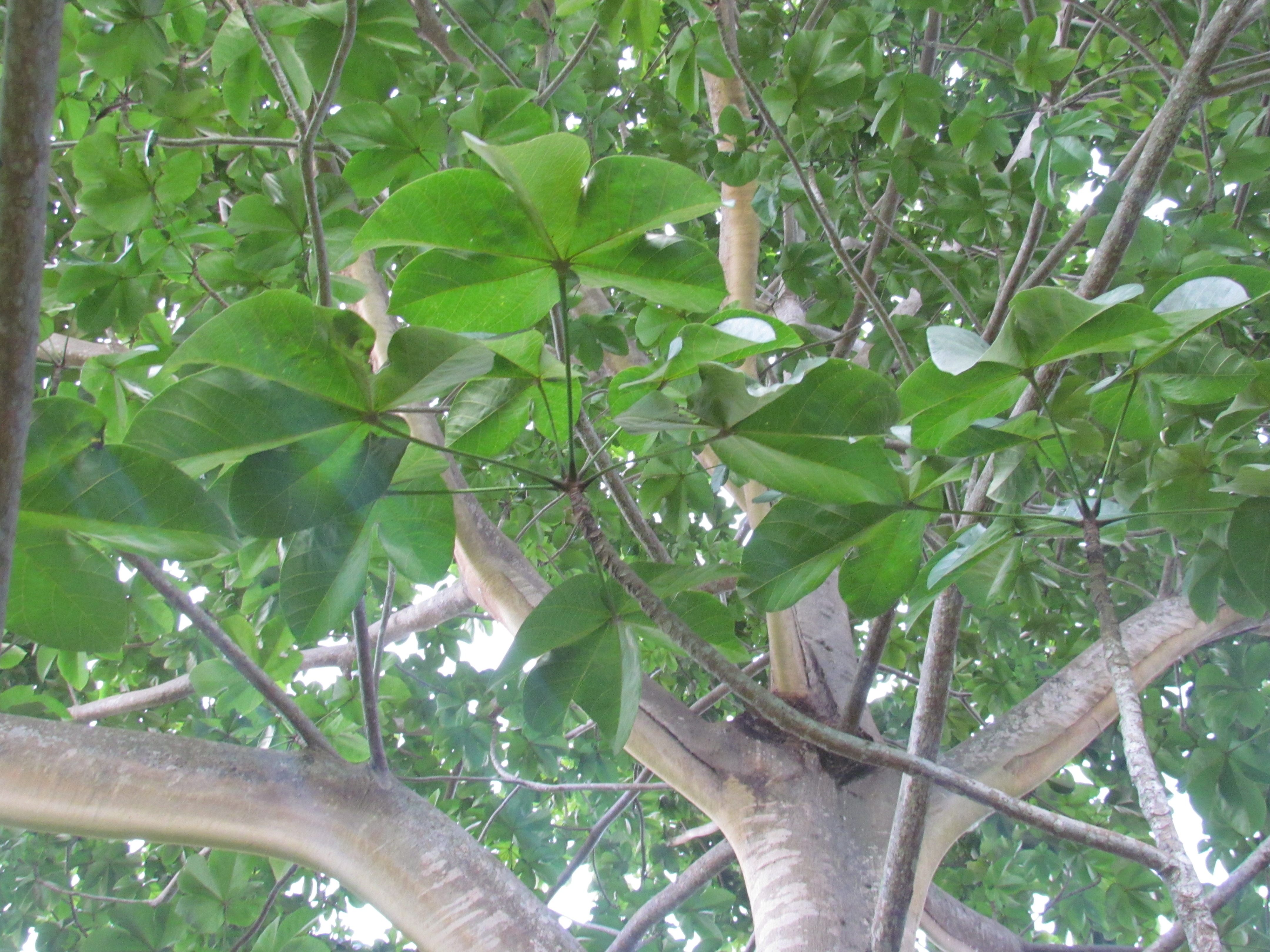 Ramas y hojas de un árbol Panamá